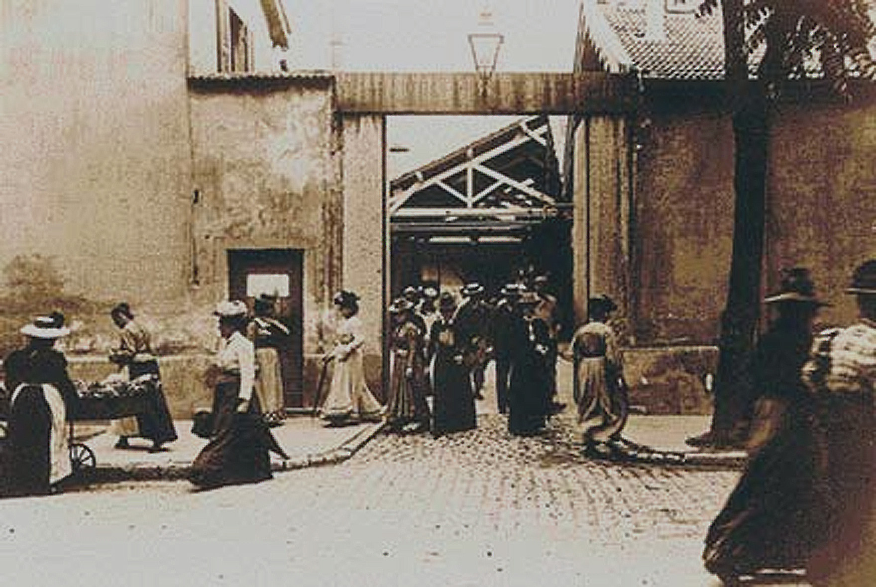 extrait du film sortie des usines Lumière à Monplaisir, Lyon (actuel hangar du 1er film à l'Institut Lumière).